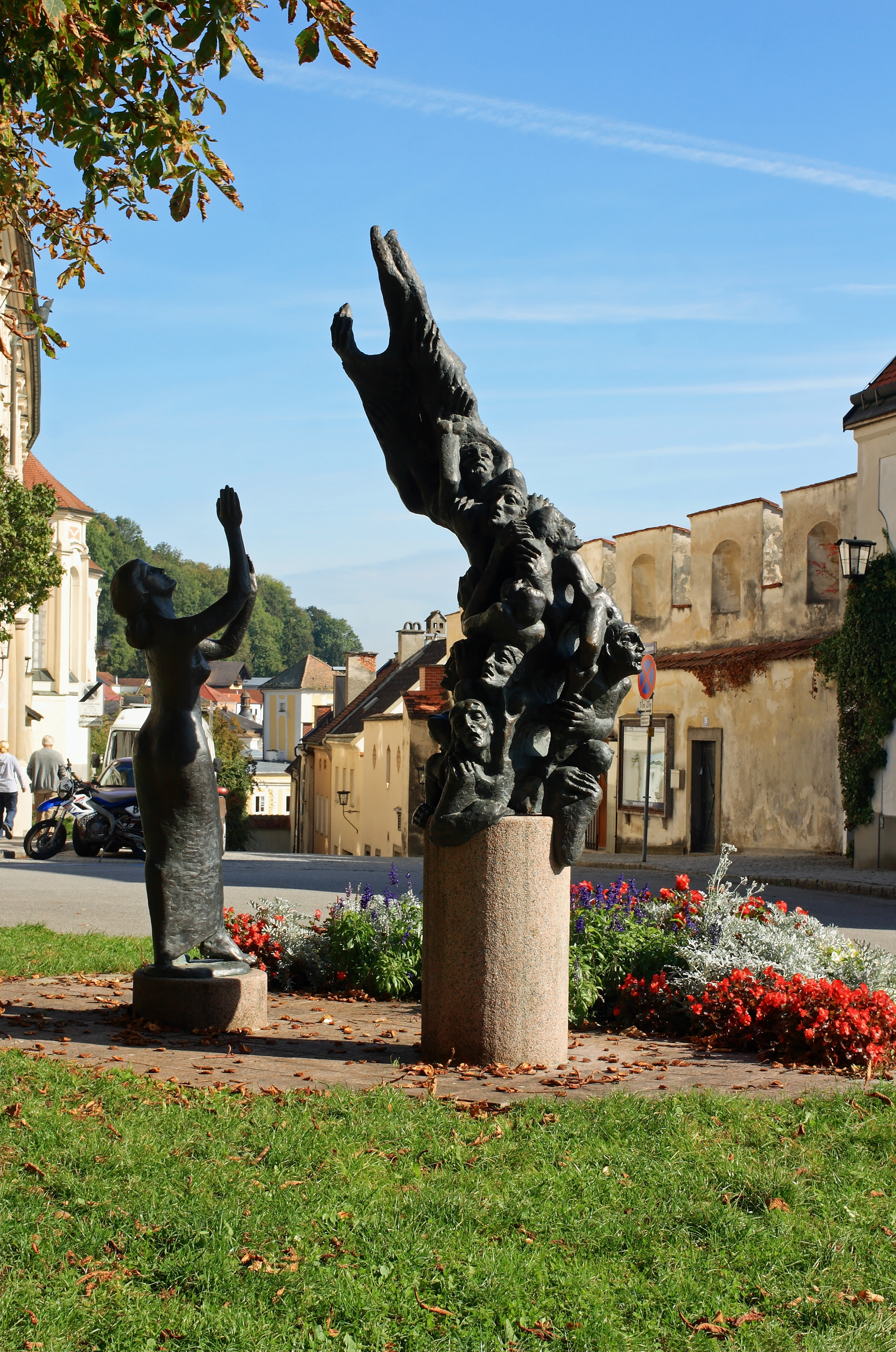 Das von Gerald Brandstötter entworfene Denkmal erinnert an die im Jahr 1397 unter Inquisitor Petrus Zwicker verbrannten Steyrer Waldenser. Es wurde 1997 am Prof.-Jörg-Reitter-Platz errichtet. Im Hintergrund verläuft die Berggasse entlang der Schlossmauer